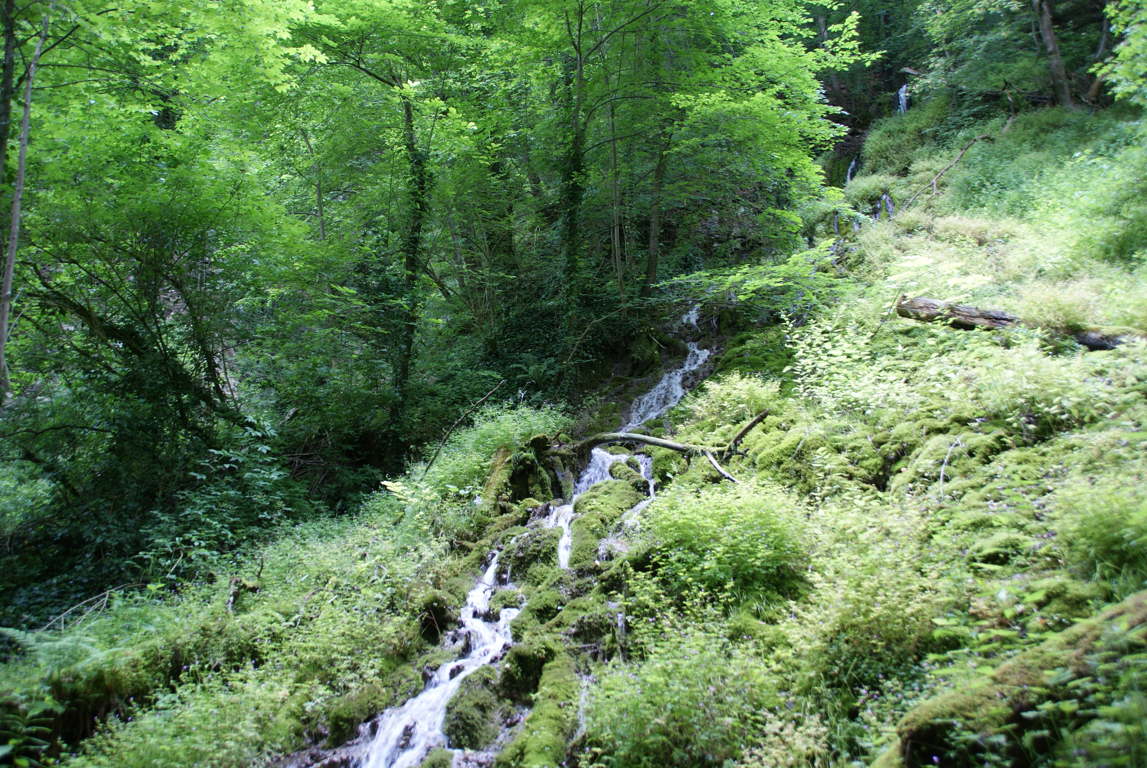 Beginn des Autalbaches, Wasserfälle zum Autal unterhalb der Brunnensteighöhle bei Aufhausen (Geislingen a.d. Steige) im Gebiet von Bad Überkingen